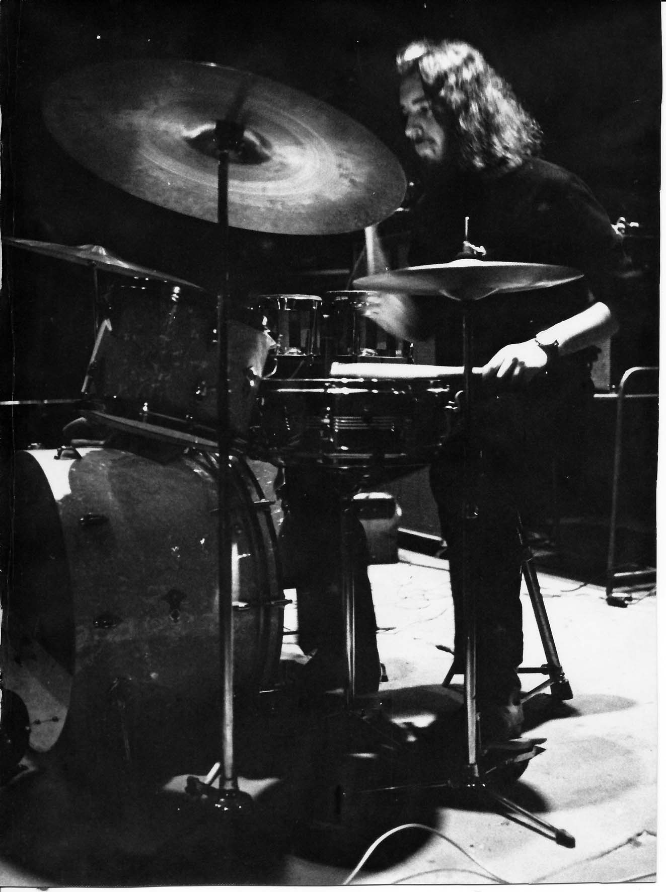 ARRELS. Agustí Sánchez Lapeira